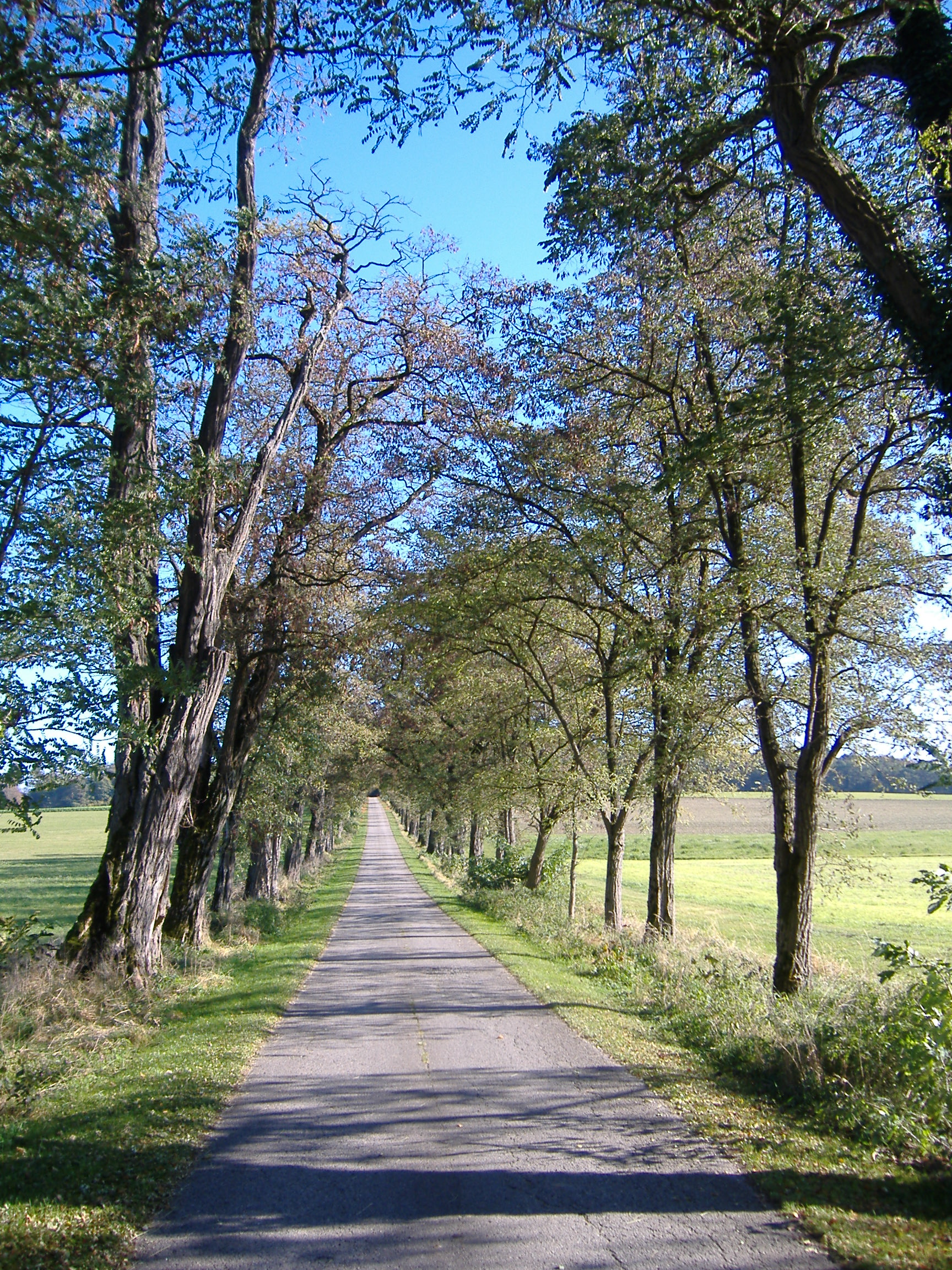 Stepperg